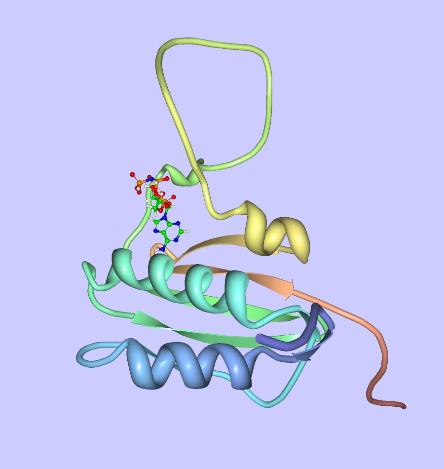 Dominio histidina kinasa.